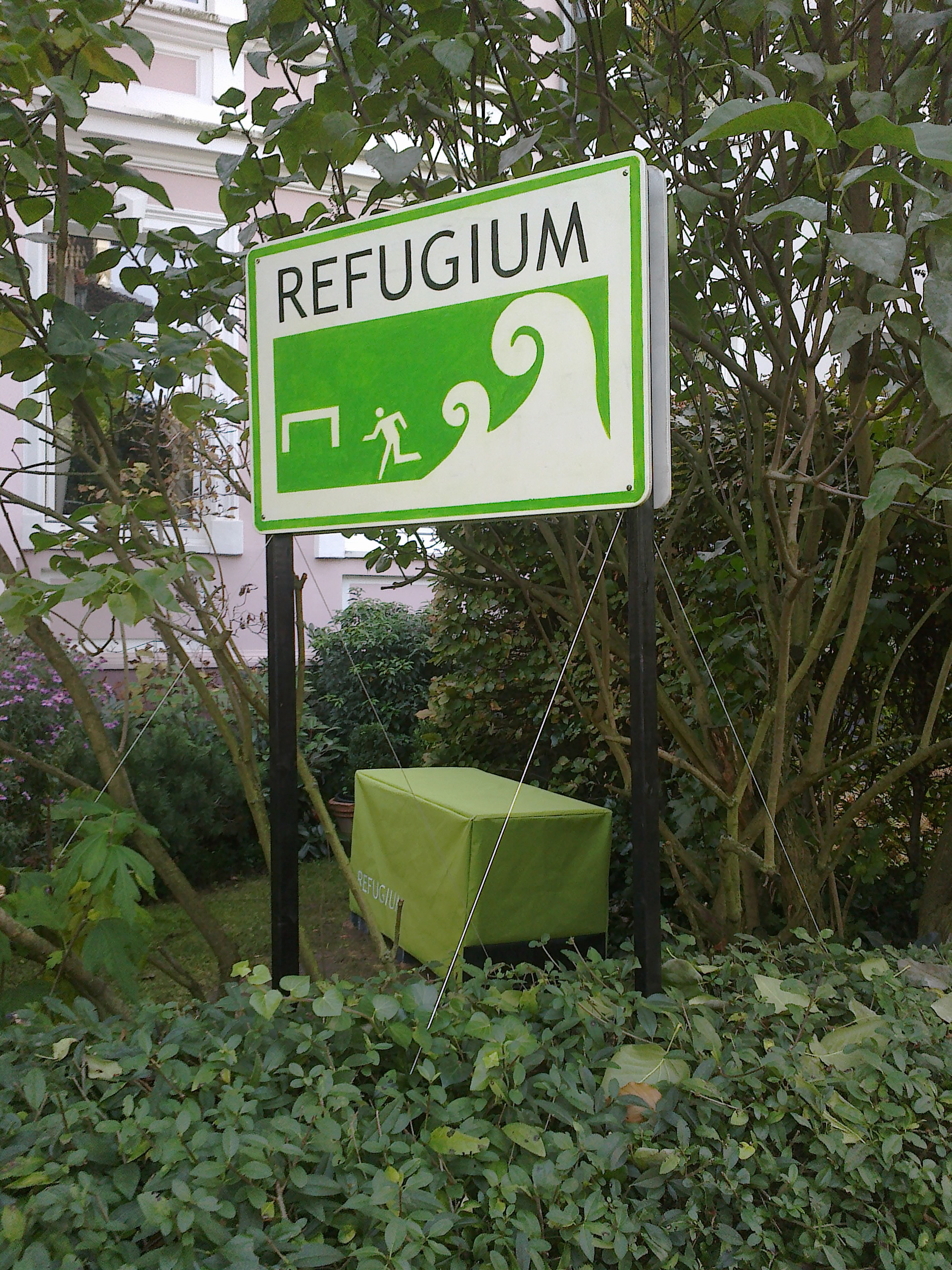 Refugium, 2012 Schild: Acryl, Lack auf Schichtholzplatte, 42 x 63 cm doppelseitig, BBQ: Mauerstein, gefärbt Grillrost: Rundstahl, Topf: Gusseisen geschwärzt Tisch, Bank: Holzbohlen, Standfüße klappbar BBQBank im Standby Maße 125 x 63 x 63 cm Künstlerin: Dagmar Schmidt Wintergärten V - Güntherstraße, Hannover